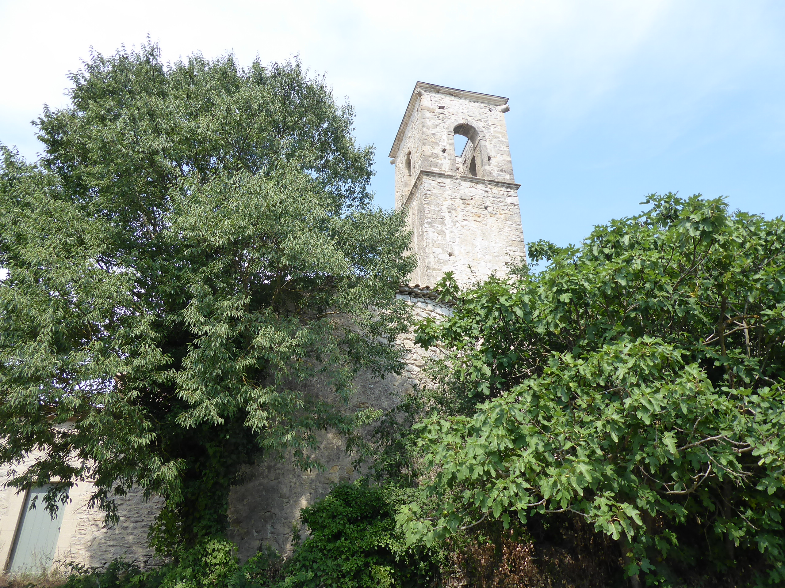 Ancienne église Saint-André, Belvézet